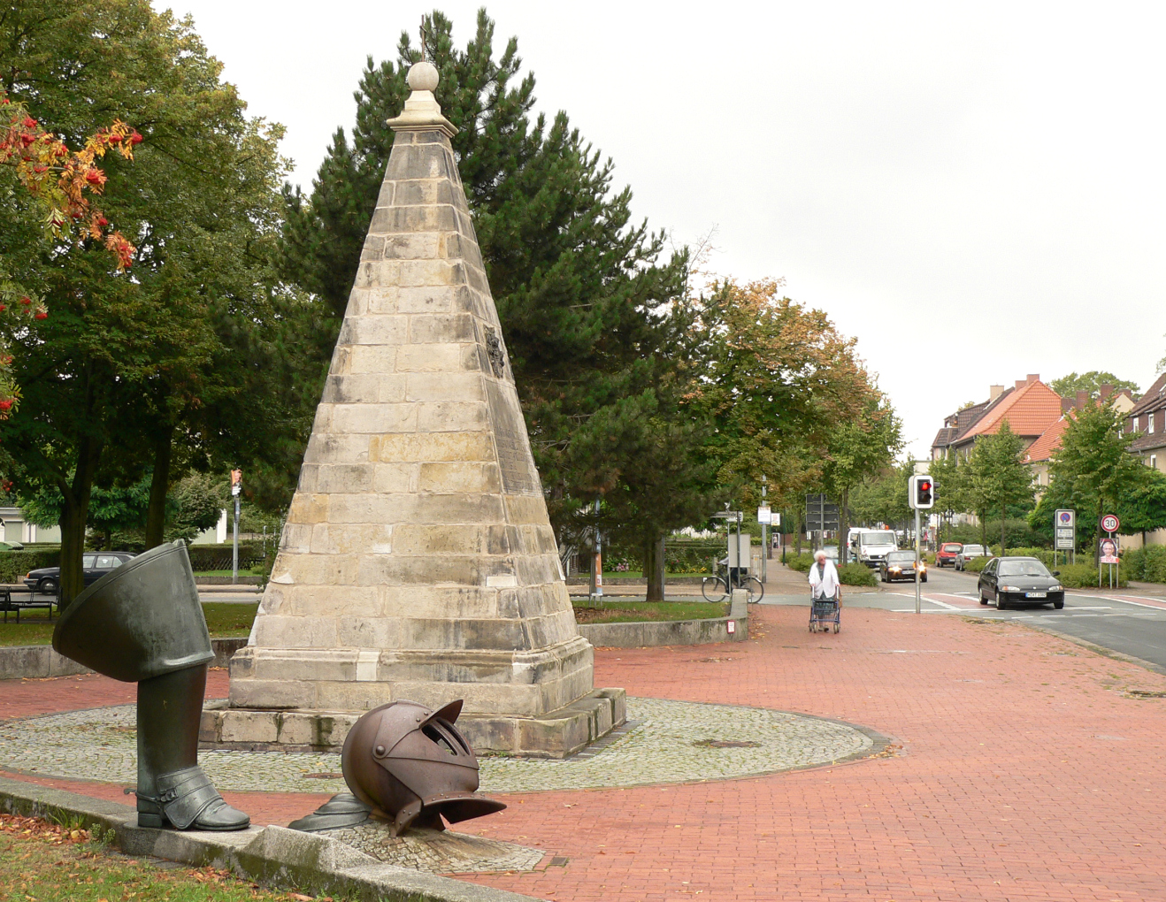 Obentraut Denkmal in Seelze Foto aufgenommen von Benutzer Benutzer:AxelHH, August 2006